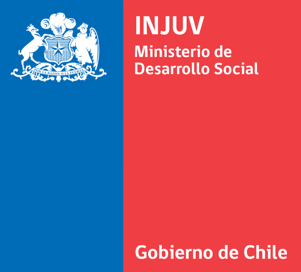 Logo Institucional de Instituto Nacional de la Juventud.